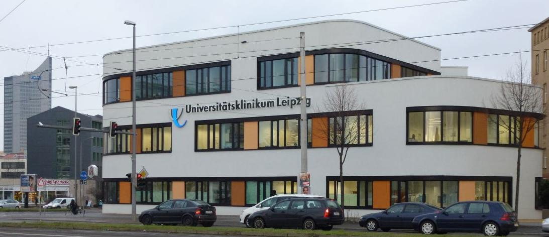 Zahnklinik der Leipziger Universität